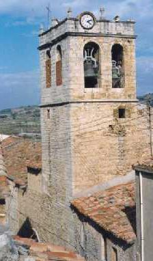 Església de l'Assumpció de Catí (l'Alt Maestrat, País Valencià). 02.042-007.